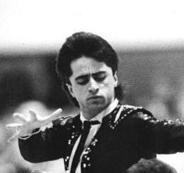 Isabelle Duchesnay, Paul Duchesnay ADN-ZB Settnik 6.4.89 Berlin: ISU-Weltschaulaufen- Das extravagante Geschwisterpaar Isabelle und Paul Duchesnay aus Frankreich begeisterte über 4000 Zuschauer in der Werner-Seelenbinder-Halle. Die Dritten im Eistanz bei den Welttitelkämpfen 1989 in Paris stellten sich einem sachkundigem Publikum mit einem Querschnitt ihres Können. Auf der zwölften Station der traditionellen Tournee der Internationalen Eislauf-Föderation (ISU) zogen die 26 Akteure in einem bunten Programm noch einmal alle Register ihres Könnens.